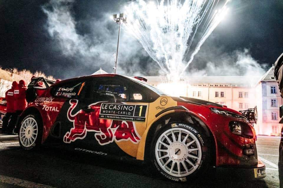 Citroën C3 WRC de Sébastien Ogier au départ du Rallye Monte-Carlo 2019.